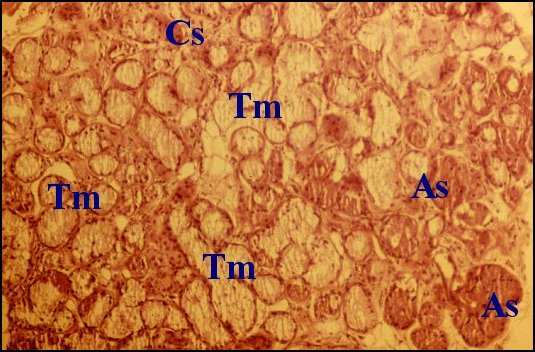 Glandes salivaires muqueuses et séreuses hétérotopiques dans l'oreille moyenne.